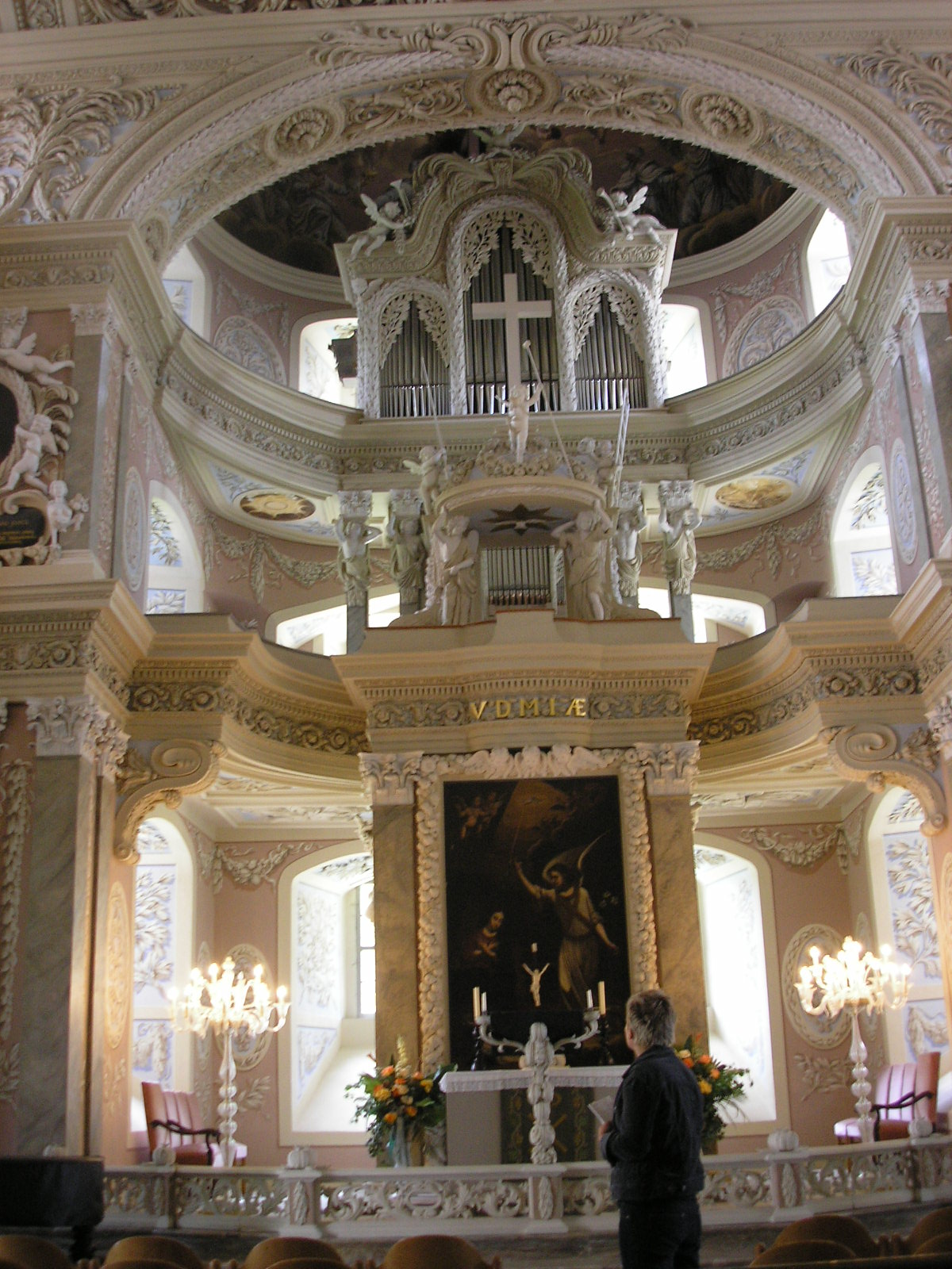 Der Altarraum der Schlosskirche in Eisenberg (Thüringen).